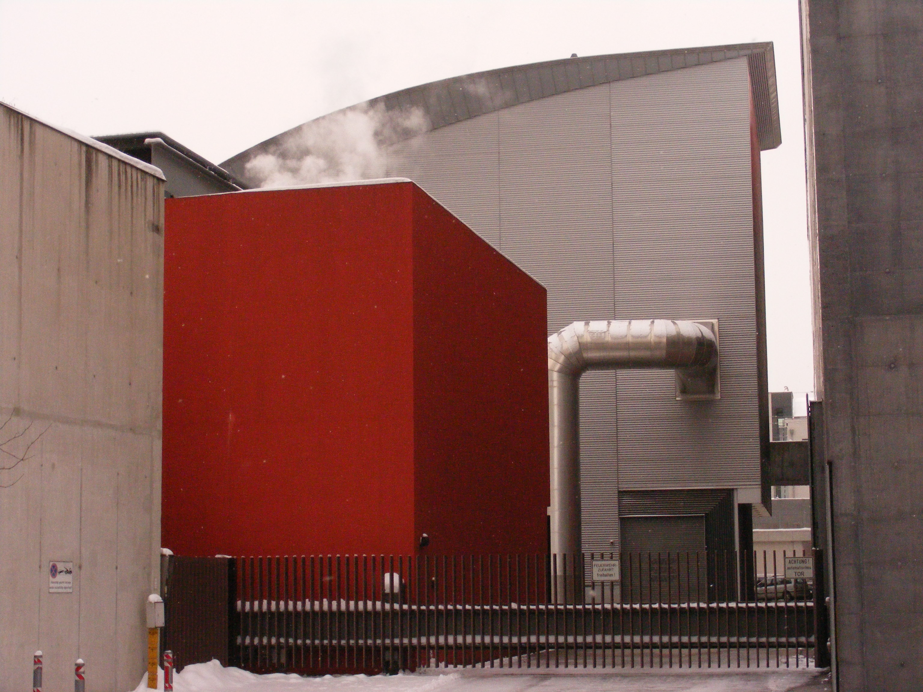 Heizkraftwerk Salzburg Mitte, seitliche Ansicht